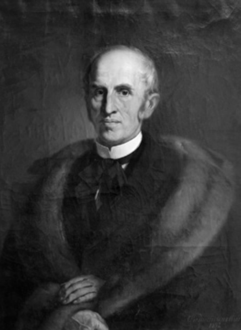 Портрет Амвросія Яновського роботи Теофіла Копистинського зі збірки Ставропігійського інституту. 1872 р.